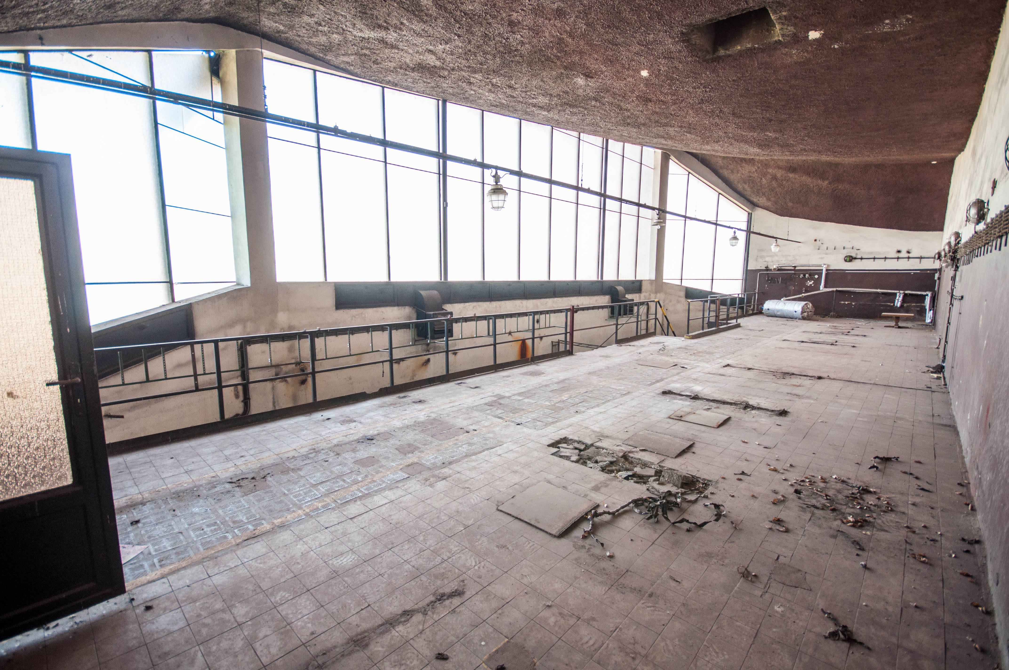 Mazutová výtopna na Invalidovně v Praze 8, balkon